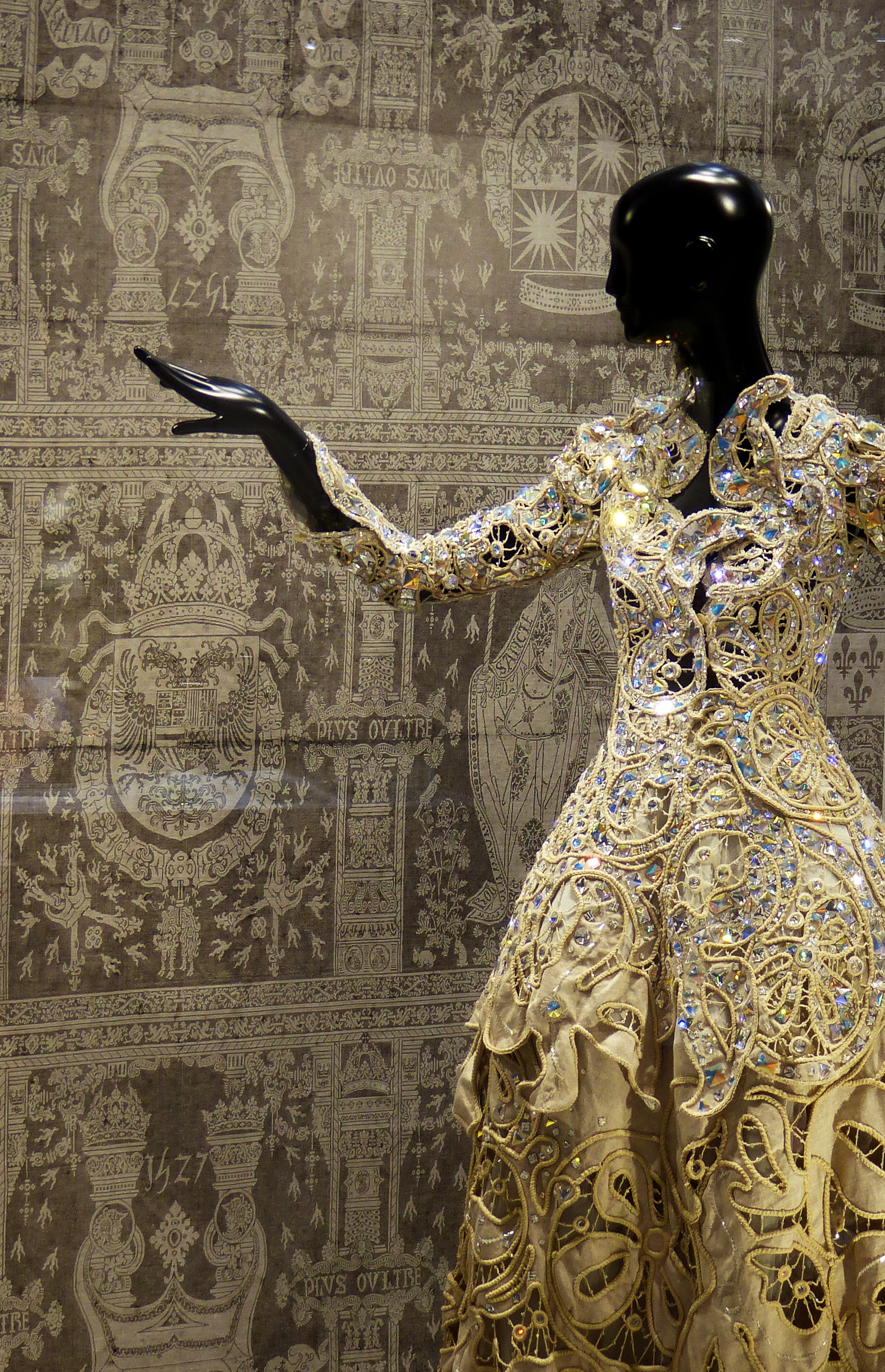 Swarovski Kristallwelten, Wattens, Ausstellungsraum